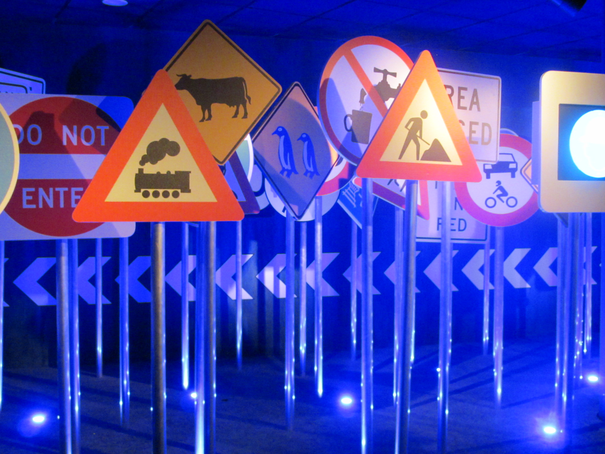 Segnali stradali al Museo Nazionale dell'Automobile di Torino